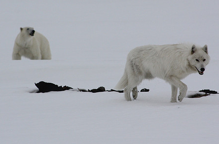 Arktischer Wolf (Canis Lupus Arctos) in Nunavut